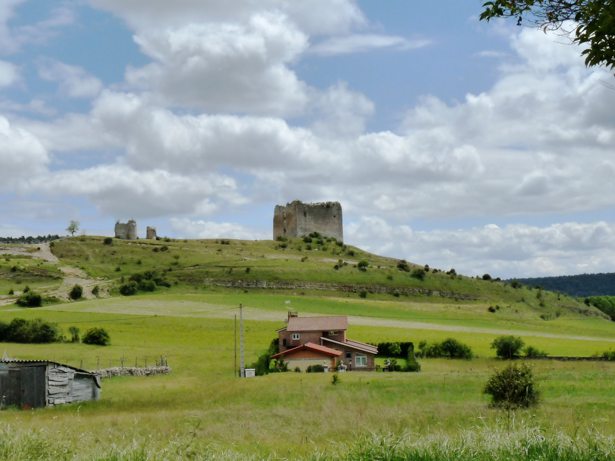 Cabrejas del Pinar - Castillo